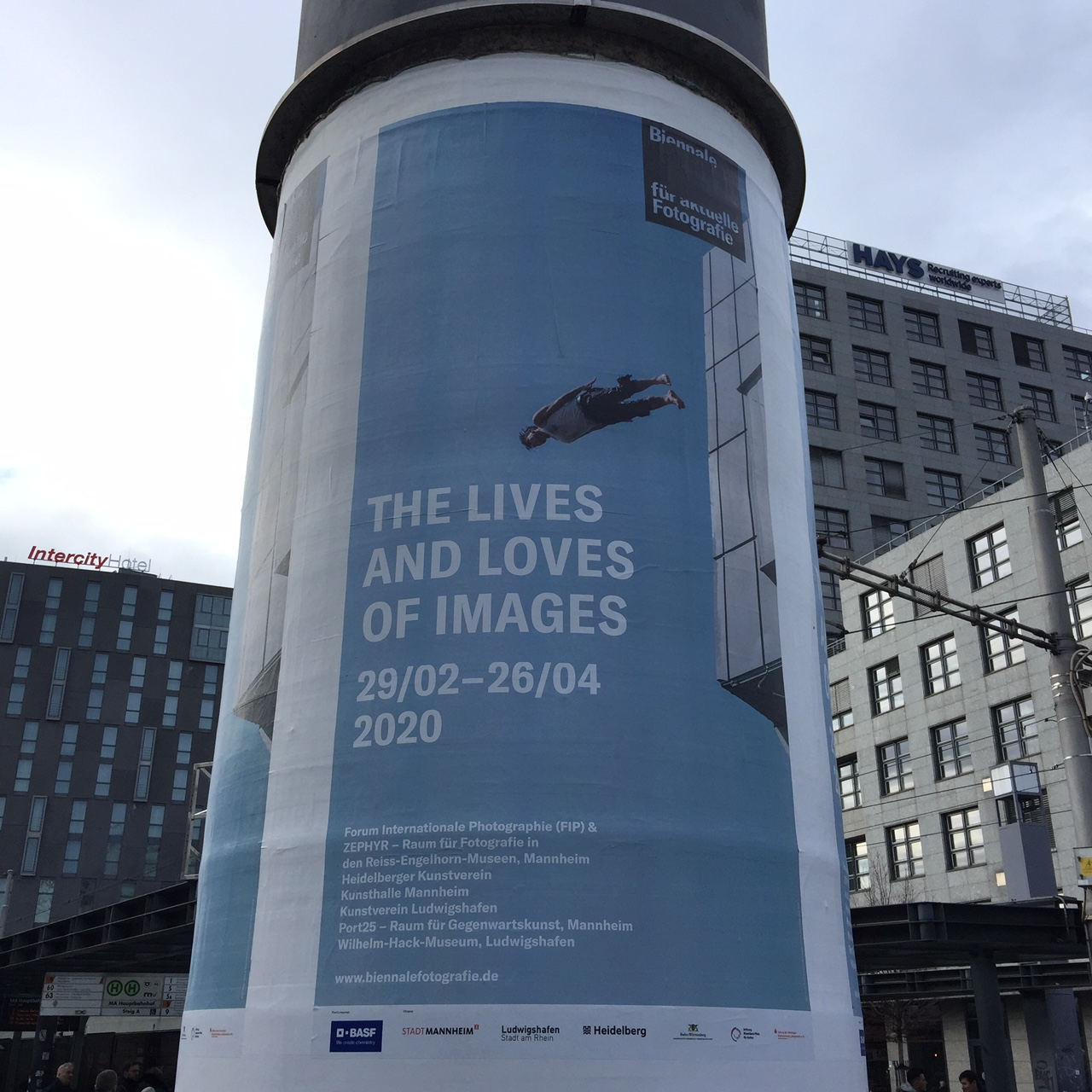 Veranstaltungsplakat der Biennale fuer aktuelle Fotografie in 2020, Titel: "The Lives and Loves of Images", mit Fotoausstellungen in Mannheim, Ludwigshafen und Heidelberg